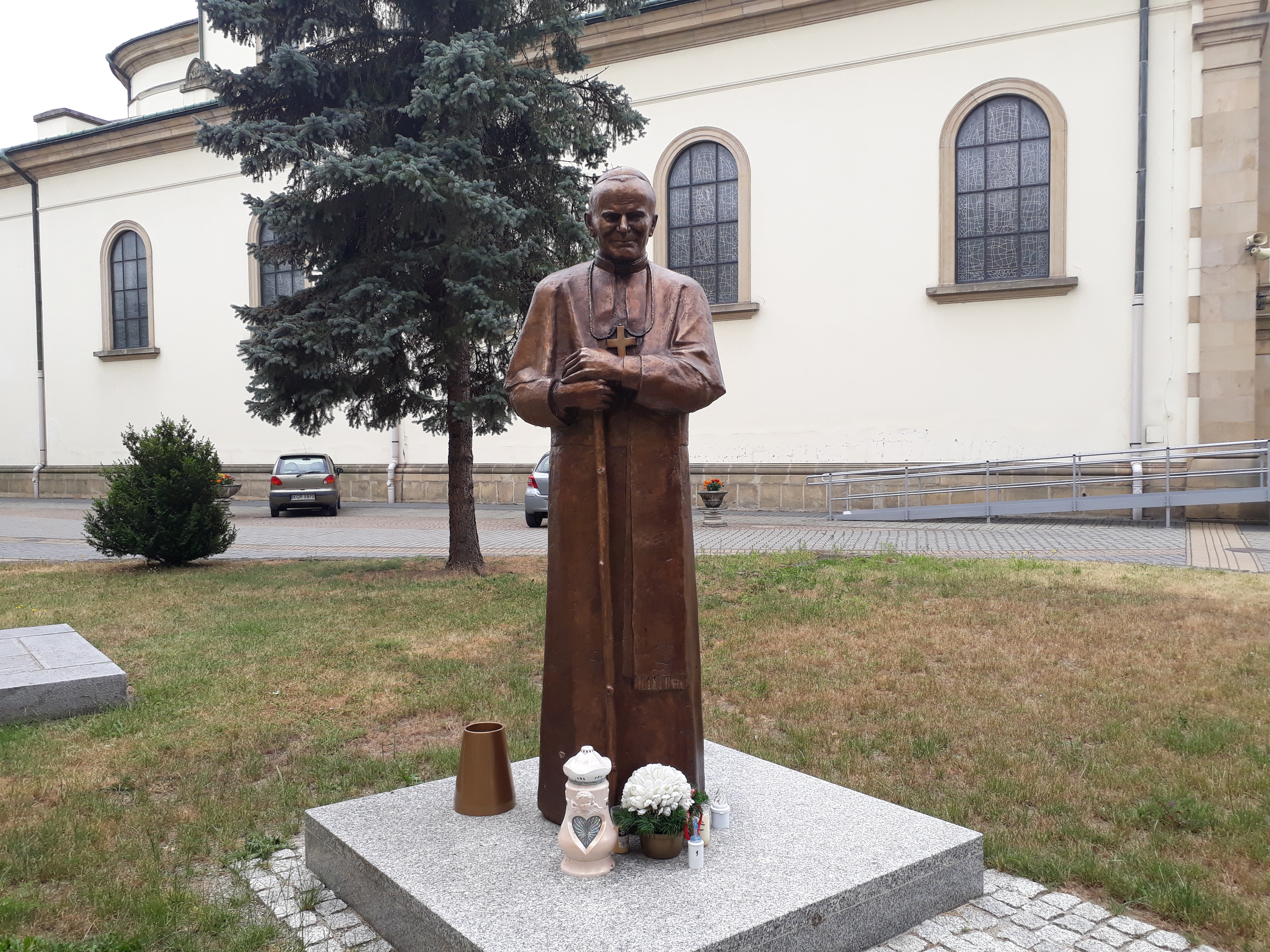 pomnik św. Jana Pawła II w pobliżu Bazyliki NMP.